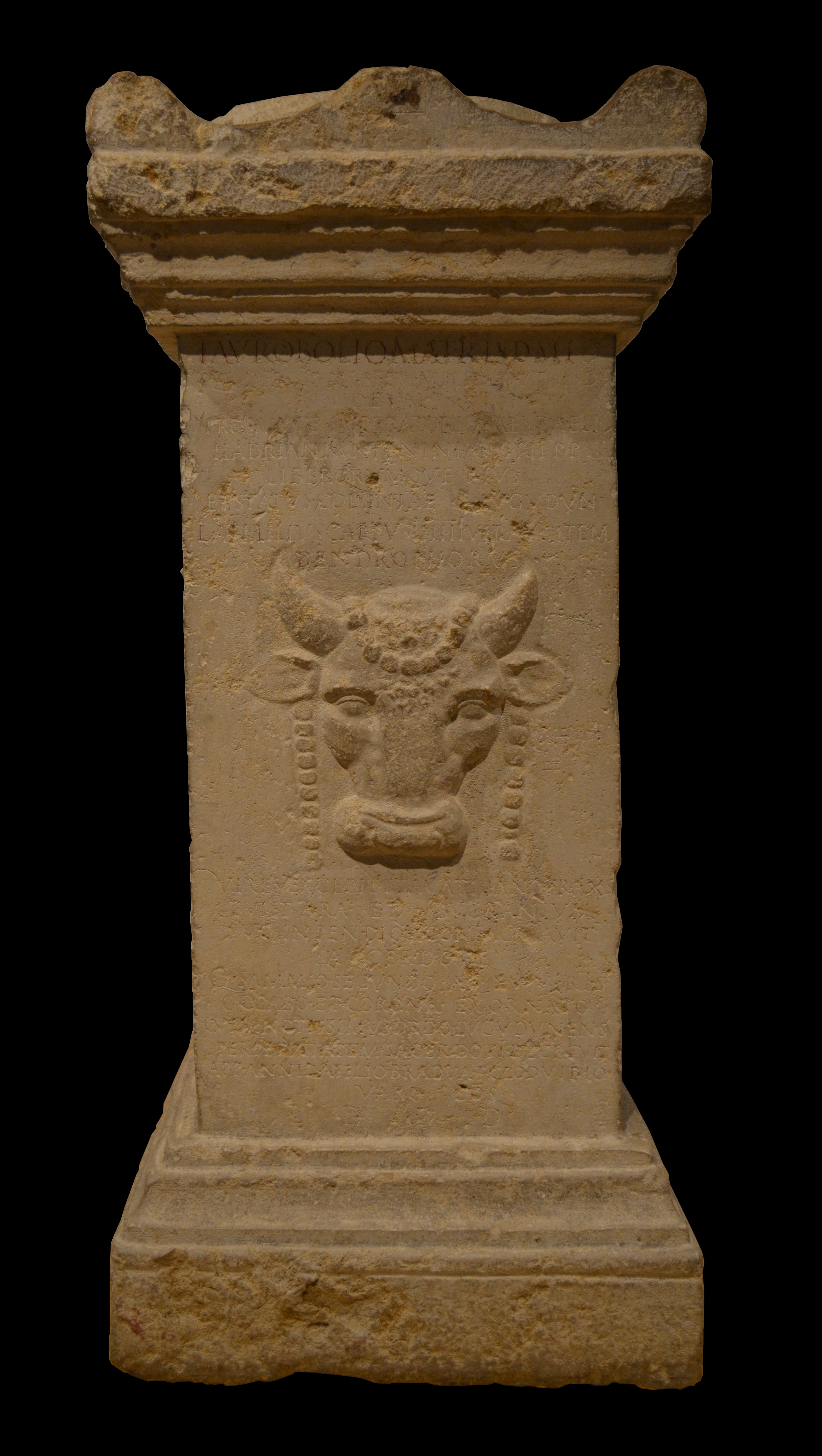 Musée gallo-romain de Fourvière (Lyon) - Autel taurobolique découvert dans le 5e arrondissement de Lyon dans un lieu indéterminé : dans le clos du sieur Bourgeat (indéterminé), derrière les ruines du théâtre, sur le versant oriental de la colline de Fourvière. Le lieu de la découverte est communément identifié avec le pseudo-sanctuaire de Cybèle à l'arrière du théâtre antique de Lyon, mais sans certitude. L'autel comporte base et couronnement. Haut. 140cm ; larg. 45cm. Taurobolio Matris d(eum) m(agnae) Id(aeae) / quod factum est ex imperio Matris [d(eum)] / pro salute imperatoris [C]aes(aris) T(i(i) Aeli / Hadriani Antonini Aug(usti) Pii p(atris) p(atriae) / liberorumque eius / et status coloniae [L]ugudun(ensium) / L(ucius) Aemilius Carpus IIIIIIvir Aug(ustalis) item / dendrophorus / vires excepti et a Vaticano trans/tulit ara(m) et bucranium / suo inpendio consacravit / sacerdote / Q(uinto) Sammio Secundo ab XV viris / occabo et corona exornato / cui sanctissimus ordo Lugudunens(ium) Perpetuitatem sacerdoti(i) decrevit / App(io) Annio Atilio Bradua T(ito) Clod(io) Vibio / Varo co(n)s(ulibus) / L(ocus) d(atus) d(ecreto) d(ecurionum) : Taurobole de la grande Mère des dieux Idaéenne, fait par on ordre pour la conservation de l'empereur César Titus Aleius Hadrien Antonin Auguste le Pieux, père de la patrie, et pour la conservation de ses enfants et le maintien de la colonie de Lyon (Lugdunum), Lucius Aemilius Carpus, sévir augustal et dendrophore, a reçu et rapporté du Vatican les vires des victimes et consacré ses frais cet autel et le bucrane. Le prêtre officiant a été Quintus Sammius Secundus, décoré par les quindécemvirs du collier et de la couronne et gratifié par décret du sanctissime consulat d'Appius Annius Atilius Bradua et de Titus Clodius Vibius Varus. L'emplacement a été donné par décret des décurions.